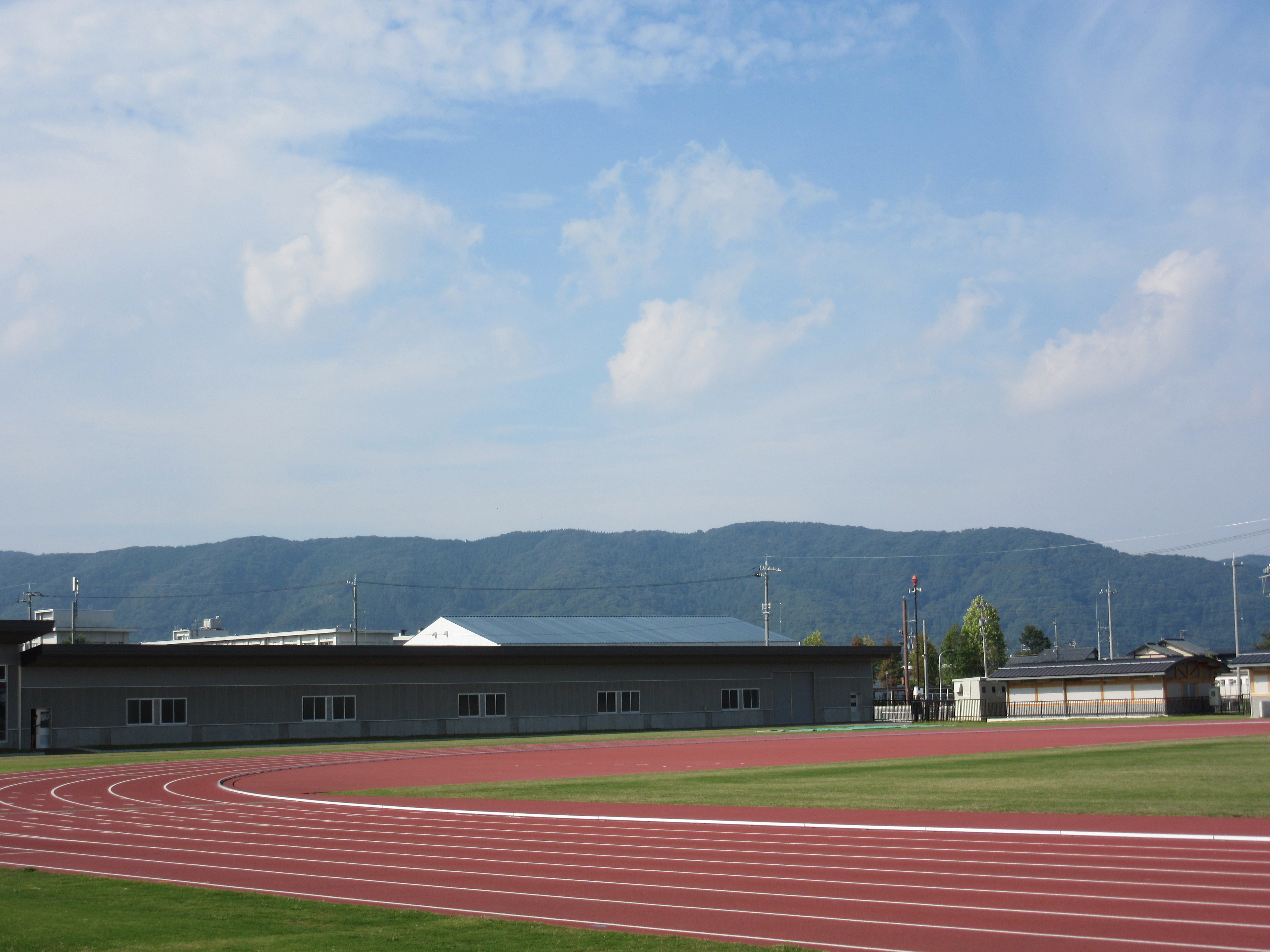 福井運動公園から眺める下市山